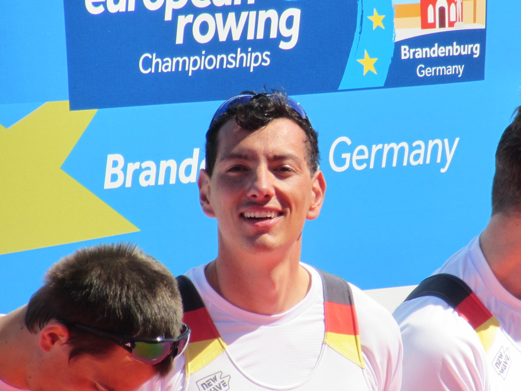 Felix Drahotta, Ruder-EM 2016